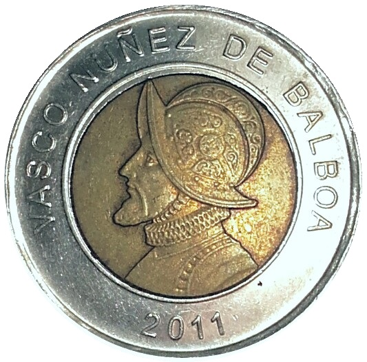 Moneda de 1 Balboa (frontal)